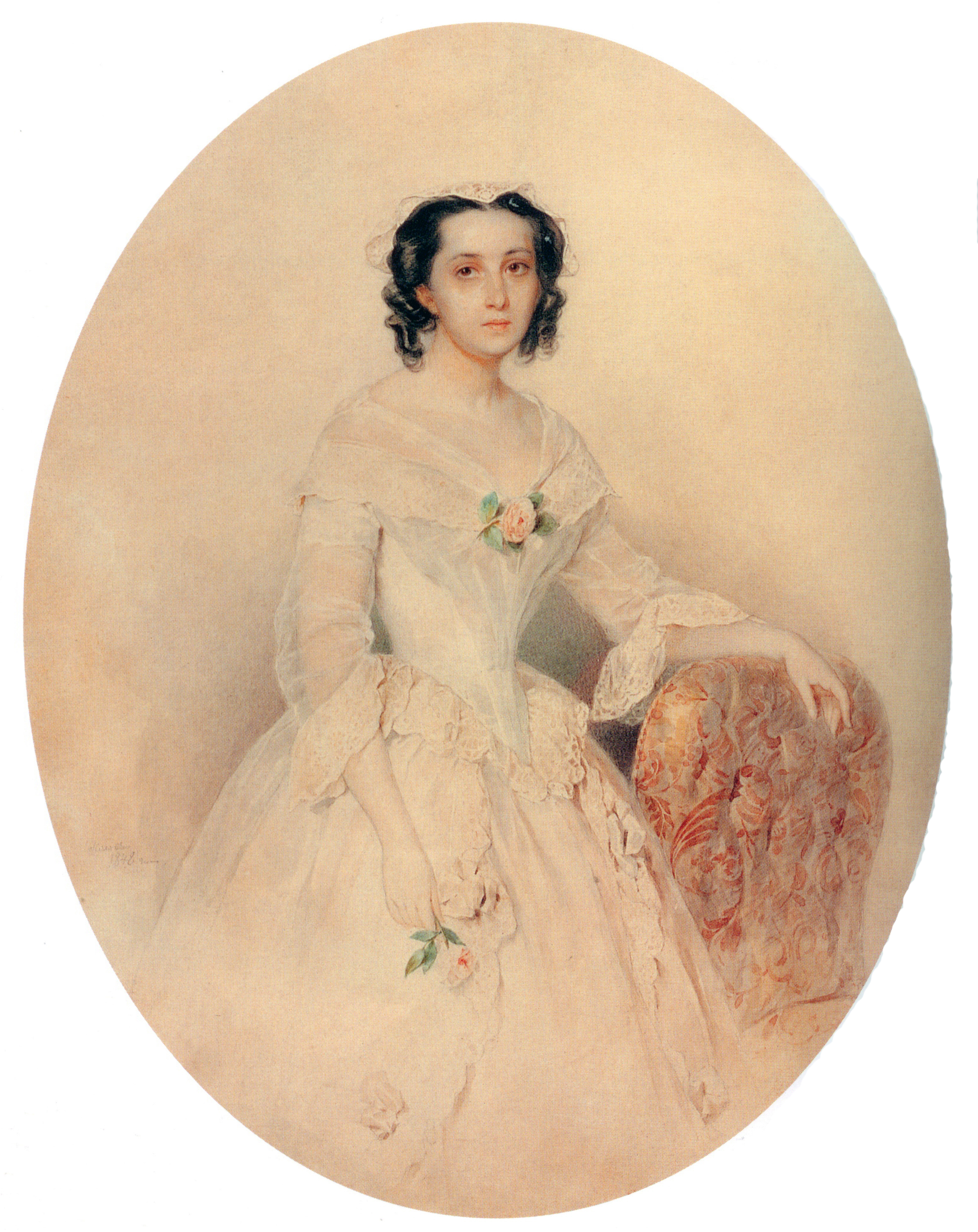 Екатерина Ивановна Менгден, ур. Бибикова (1821—1902), в 1 браке Оболенская.